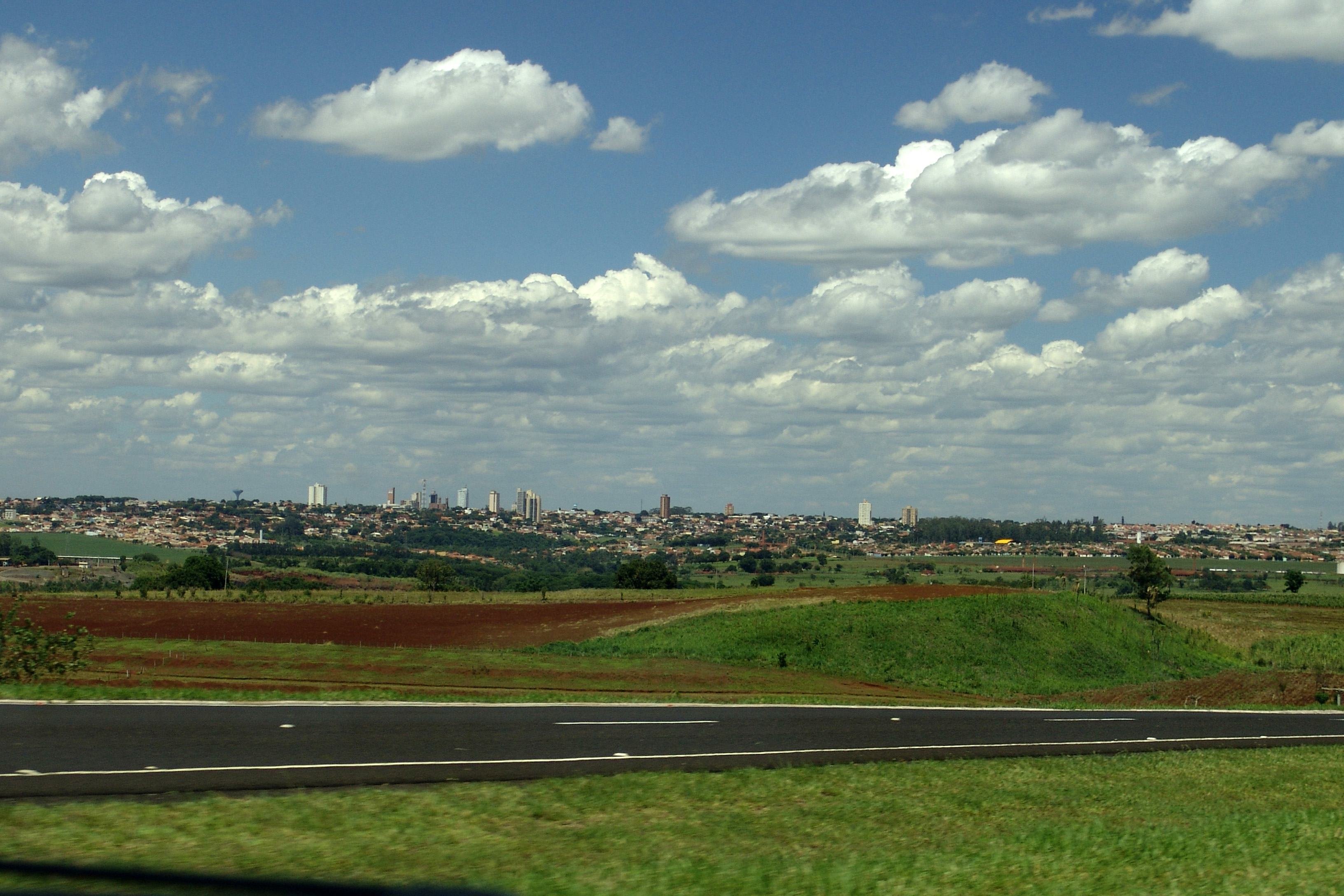 Vista do município de ptOurinhos, São Paulo, Brasil